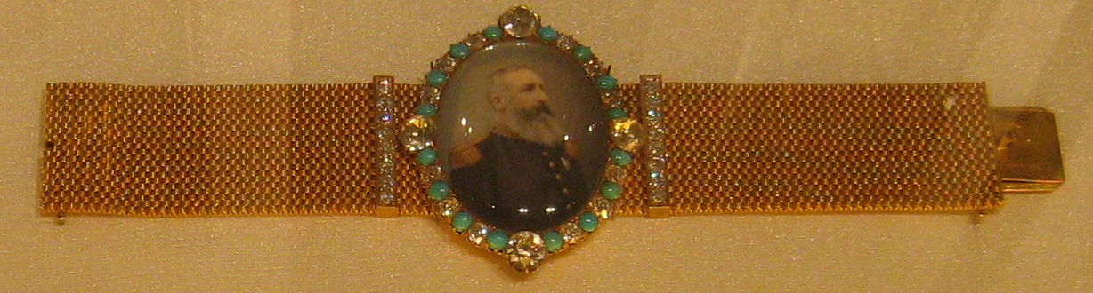 Bracelet offert à l'explorateur Henry Morton Stanley par le roi des Belges Léopold II.